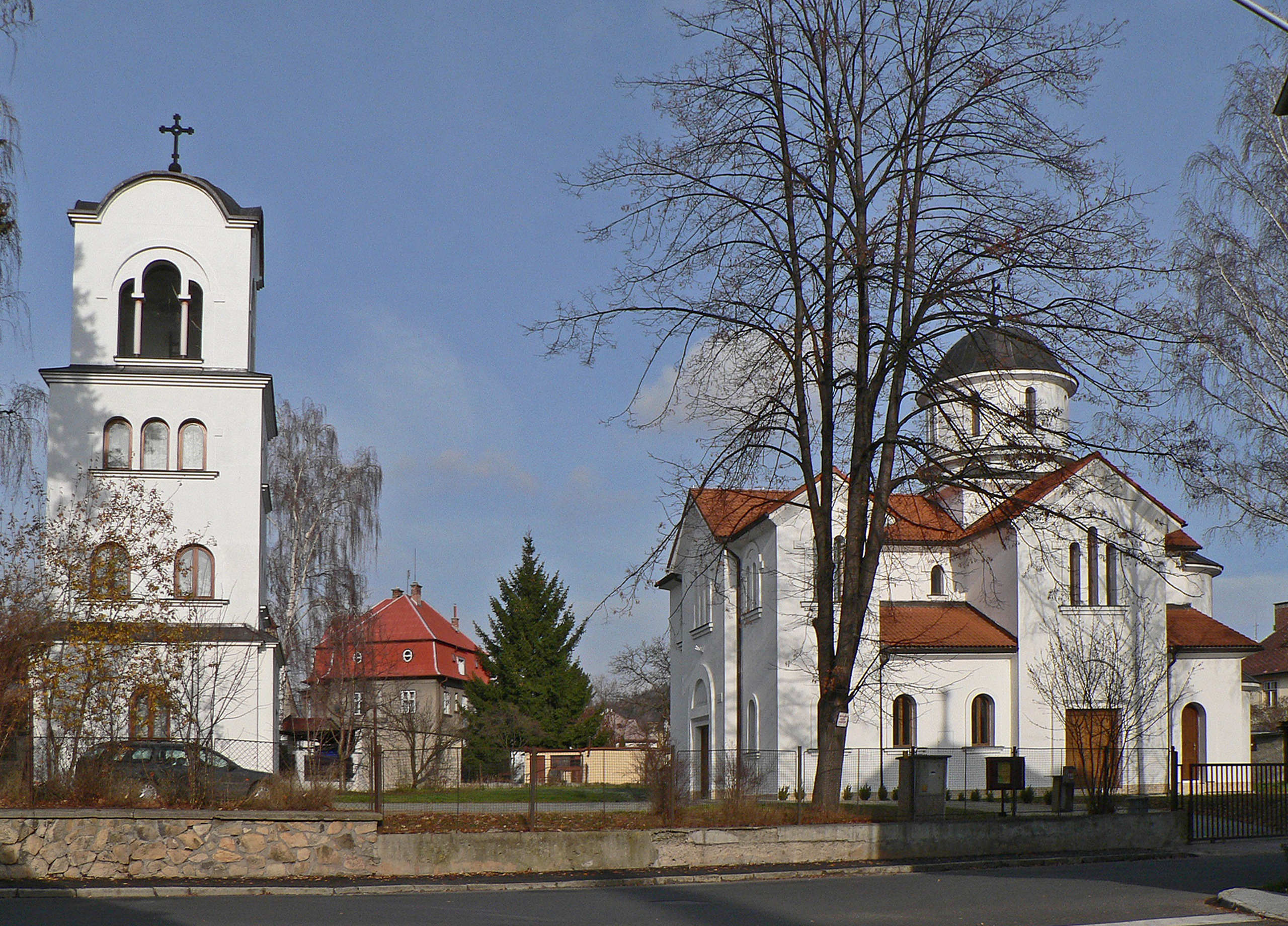 Kostel svatého Ducha (Šumperk)